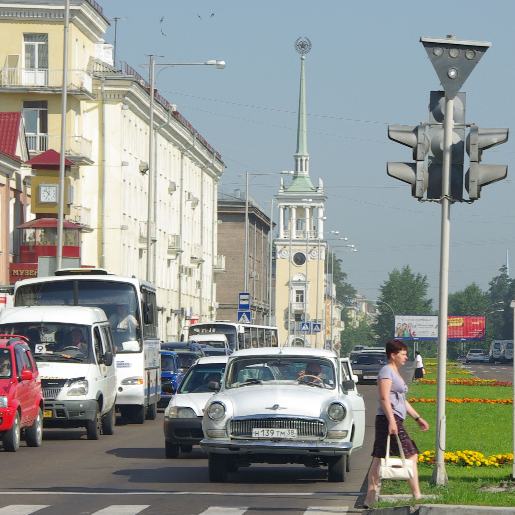 ГАЗ-21 в центре Ангарска